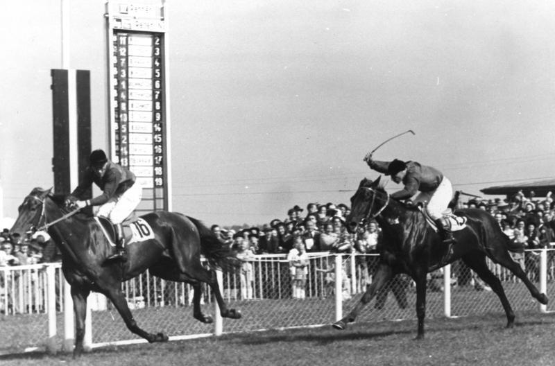 Illus-dpd "Alsterblüte" gewinnt das 80. deutsche Derby. Bei strahlendem Sonnenwetter fand in Hamburg-Horn das 80. Deutsche Derby vor 50000 Zuschauern statt. Sieger wurde die Stute "Asterblüte" mit Jockey Walter Held aus dem Stall Schlenderhan vor ihrer Stallgefährtin Aubergine mit eineinhalb Längen Vorsprung. Unser Bild zeigt "Alsterblüte" im Ziel vor Aubergine. 10-7-49 3569-49